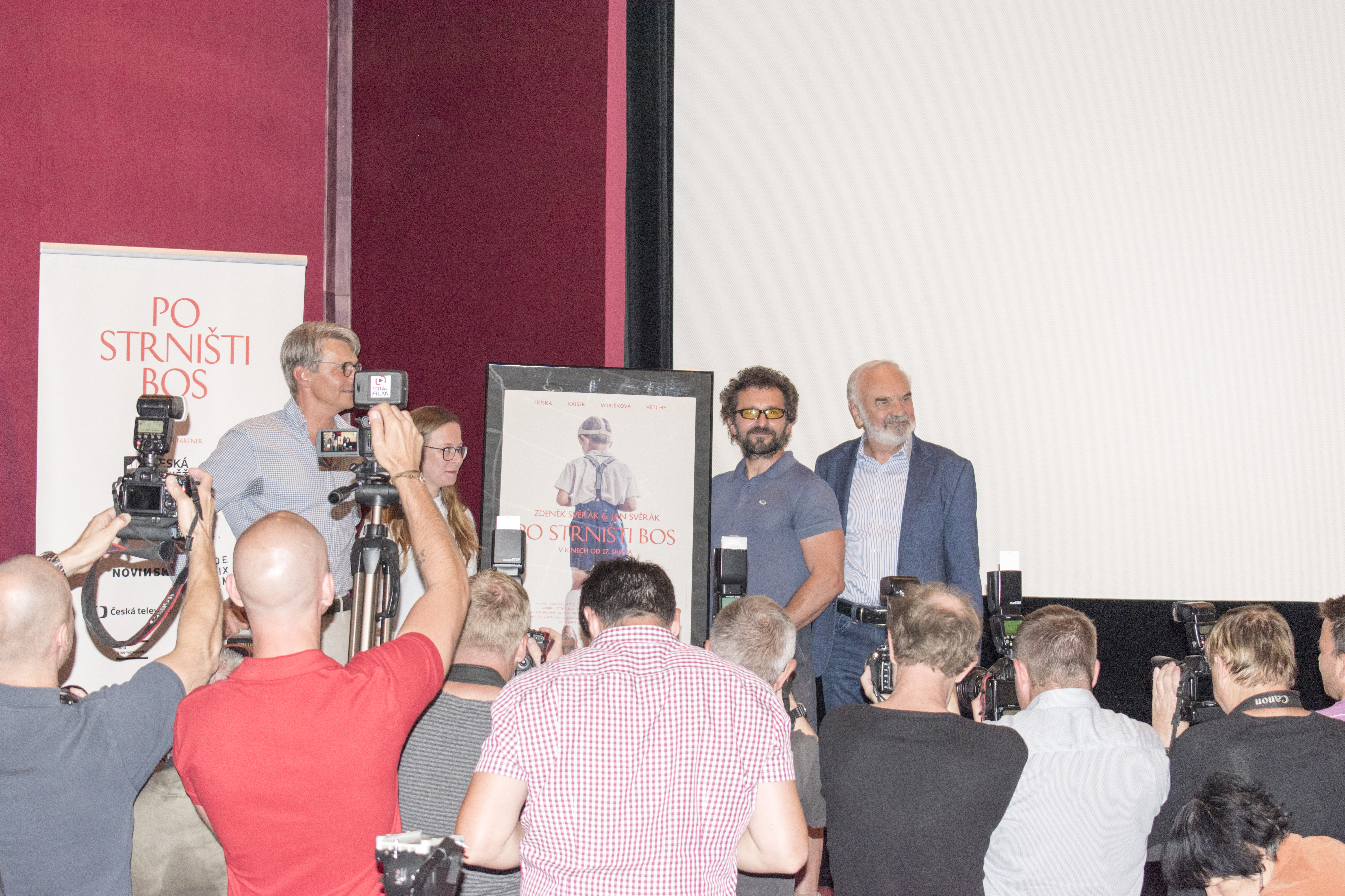 Fotky z novinářské konference 15. 6. 2017 (Jiří Borový - Kritiky.cz)